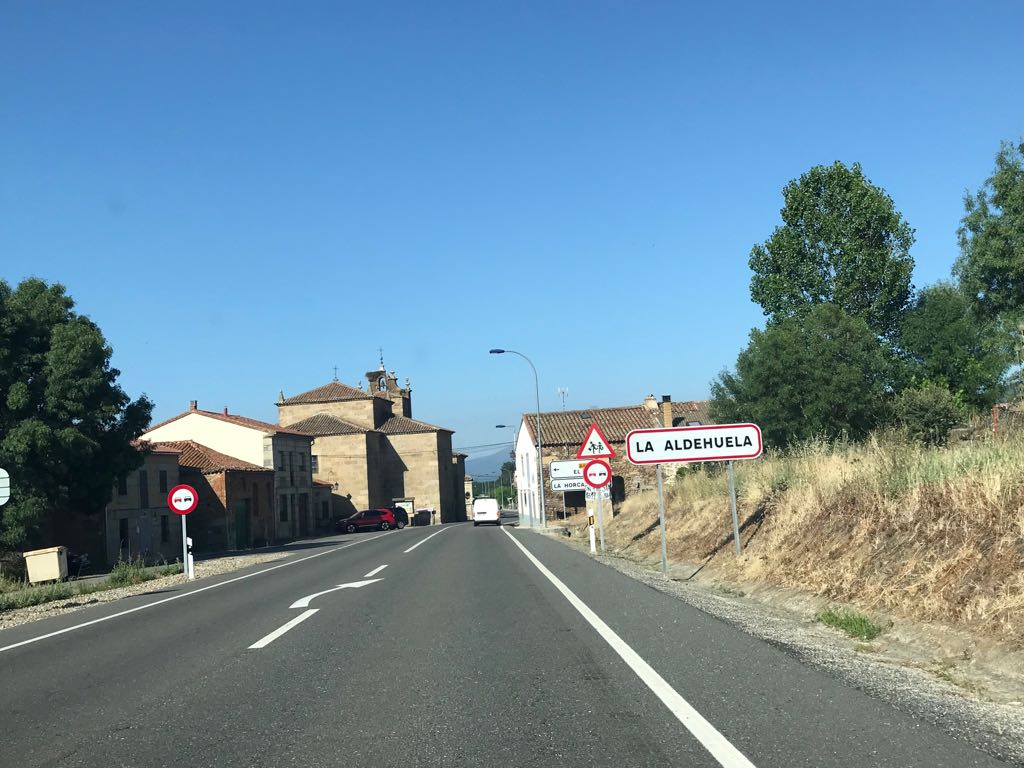 Carretera N-110 en La Aldehuela Ávila España